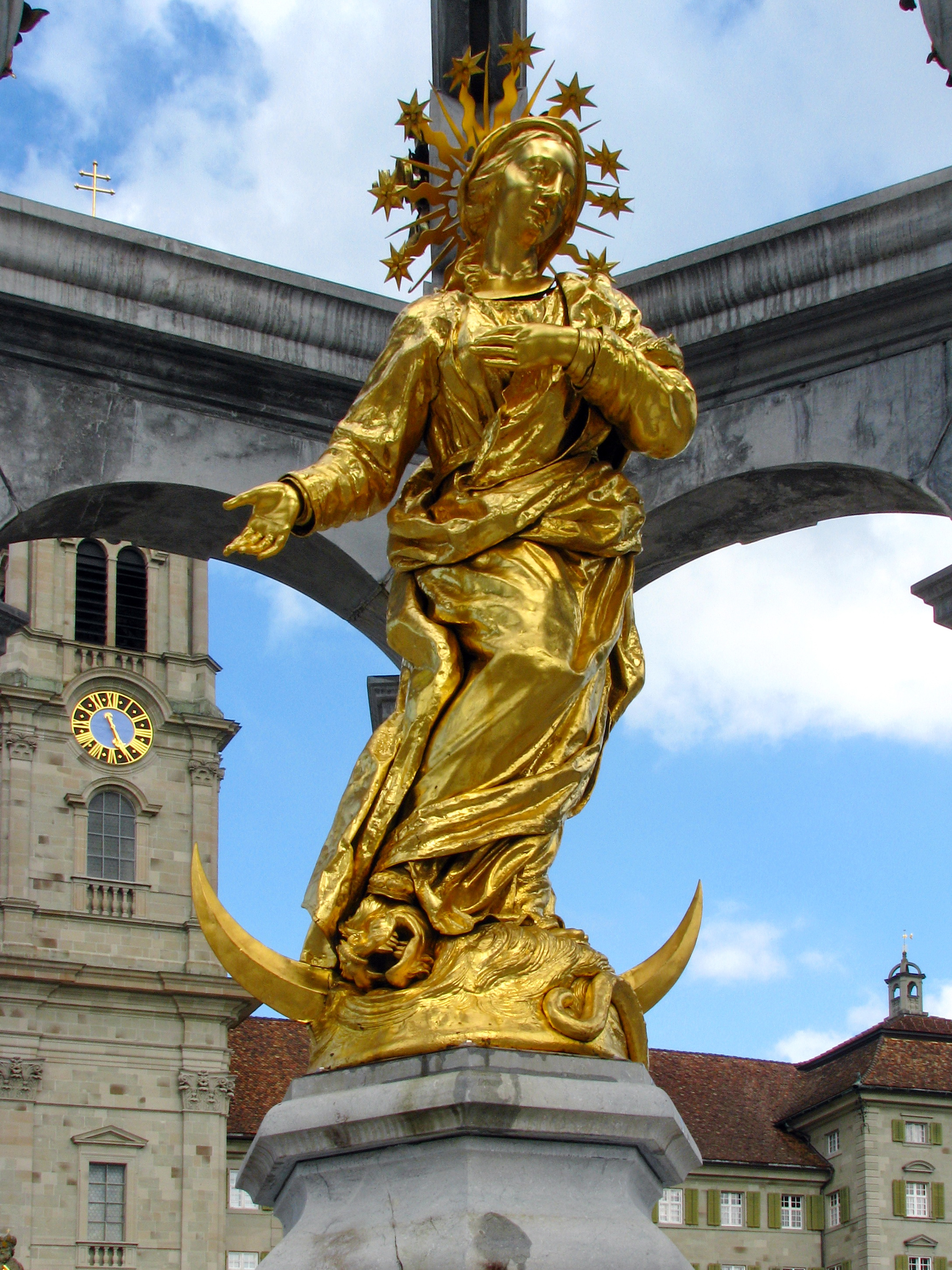 Marienbrunnen on Hauptplatz in front of the Benedictine Abbey in Einsiedeln (Switzerland)